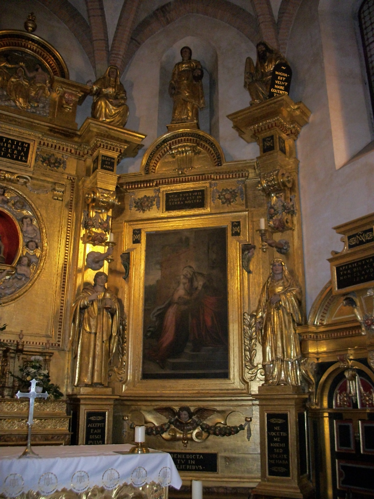 Le retable du chœur.